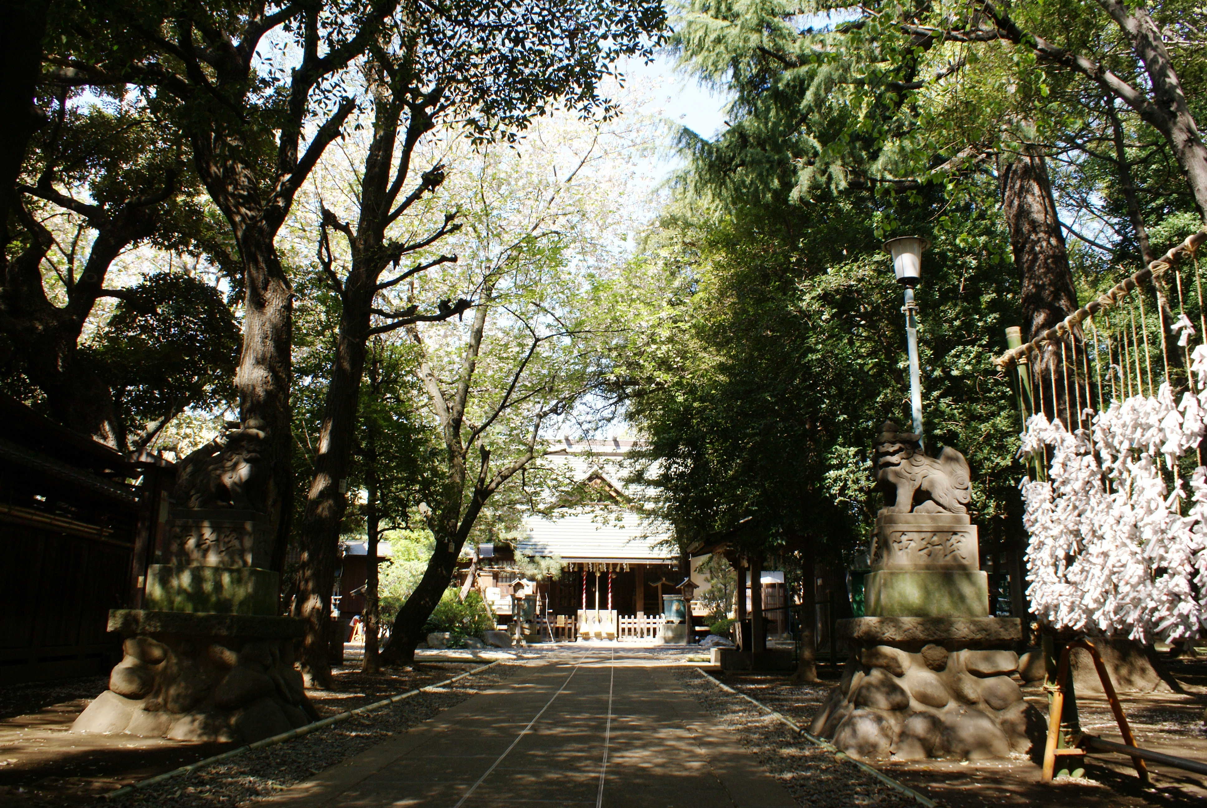 南常盤台天祖神社